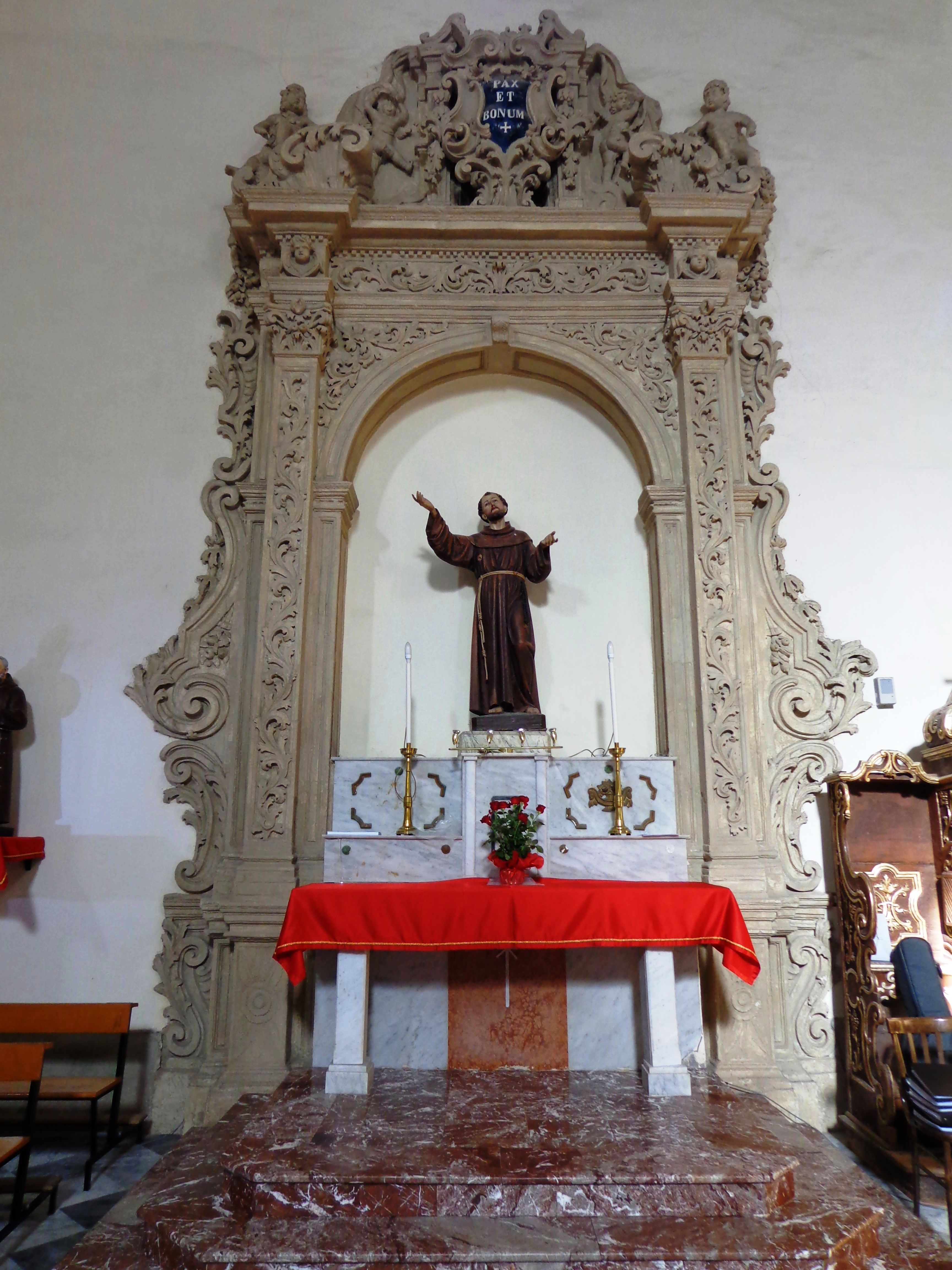 Duomo Condrò altare Sant'Antonio di Padova